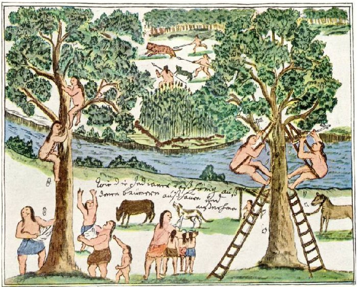 "Bajando miel" (1830) Florían Paucke (1719-1789). Argentina. En el Museo Nacional de Bellas Artes, en Buenos Aires. Oleo sobre tela, 45 cm x 54 cm